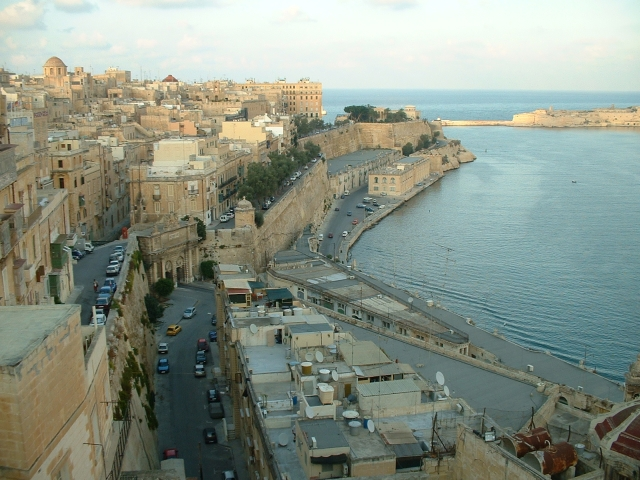 Eine Ansicht der Stadtmauern Vallettas von der Ostseite her.